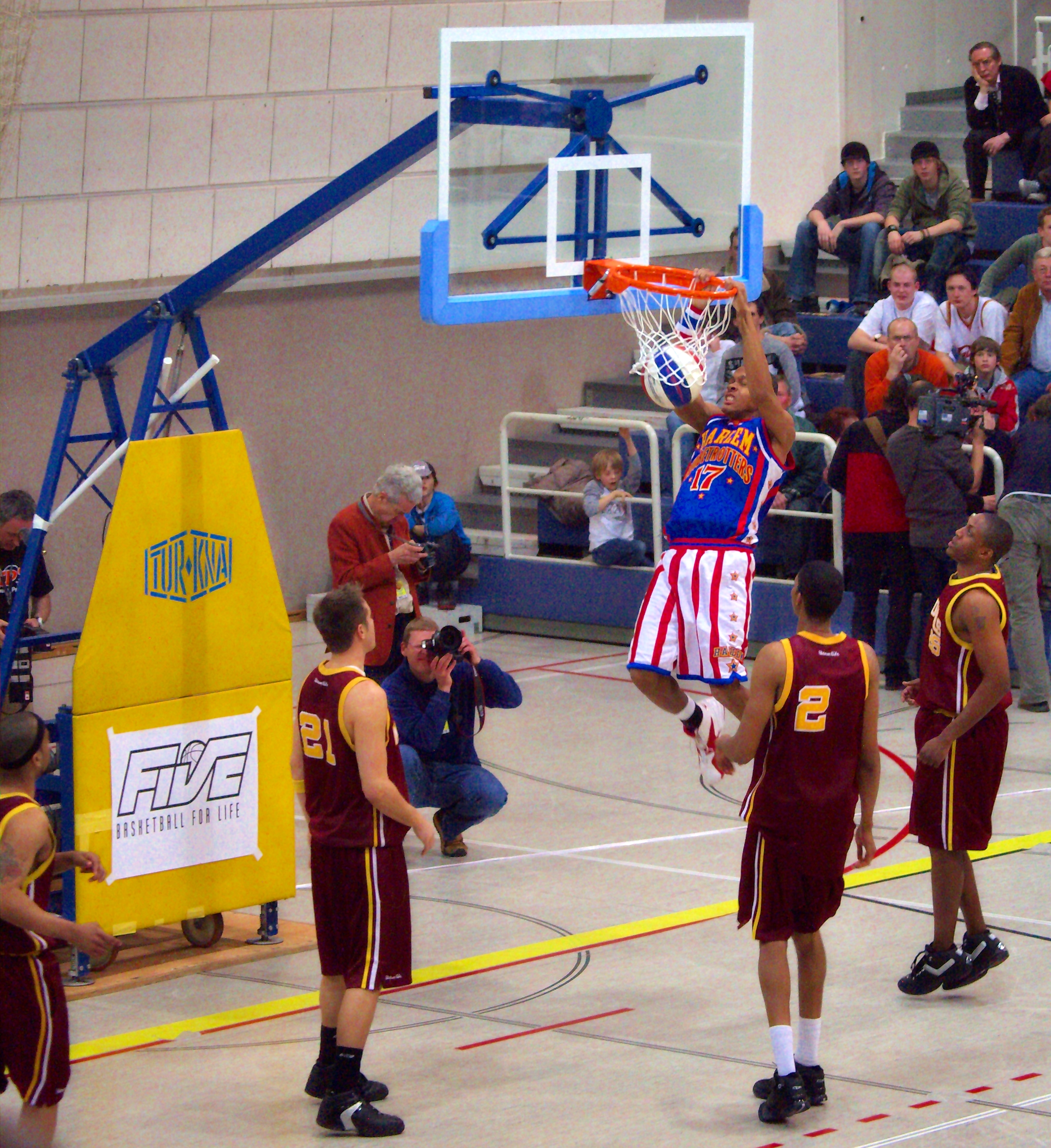 Harlem Globetrotters in Salzburg 29.03.2007